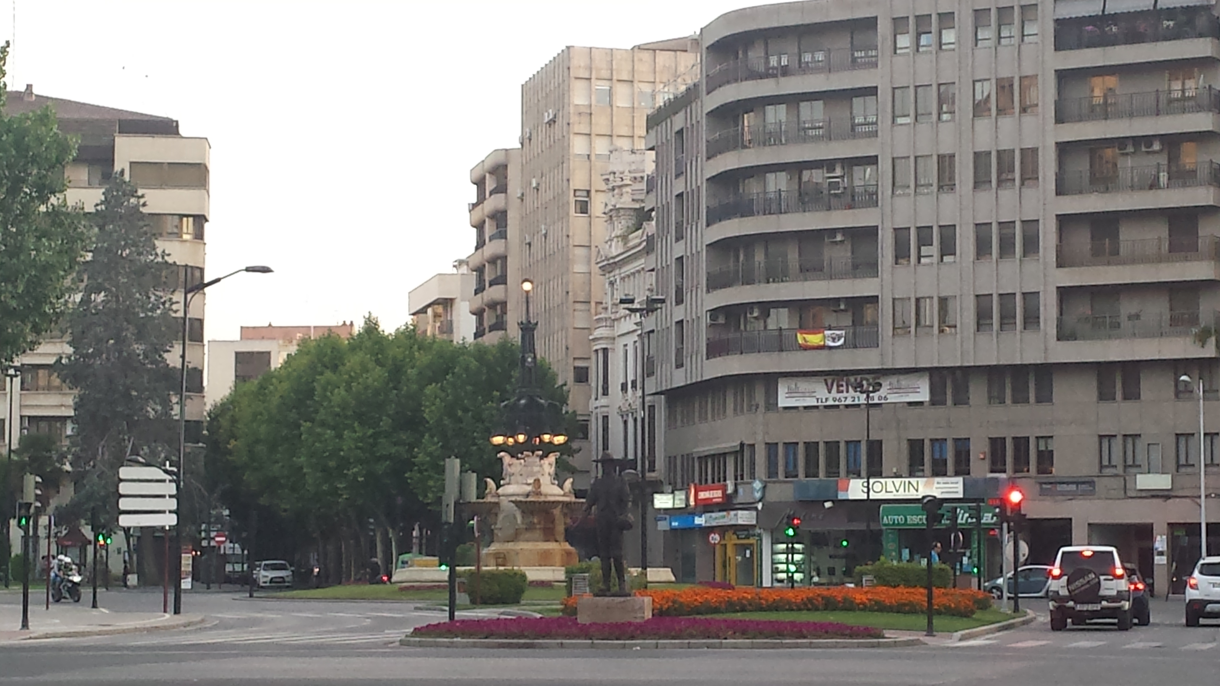 El Sembrador. Fuente de las Ranas. Avenida de la Estación. Paseo de la Libertad. Albacete